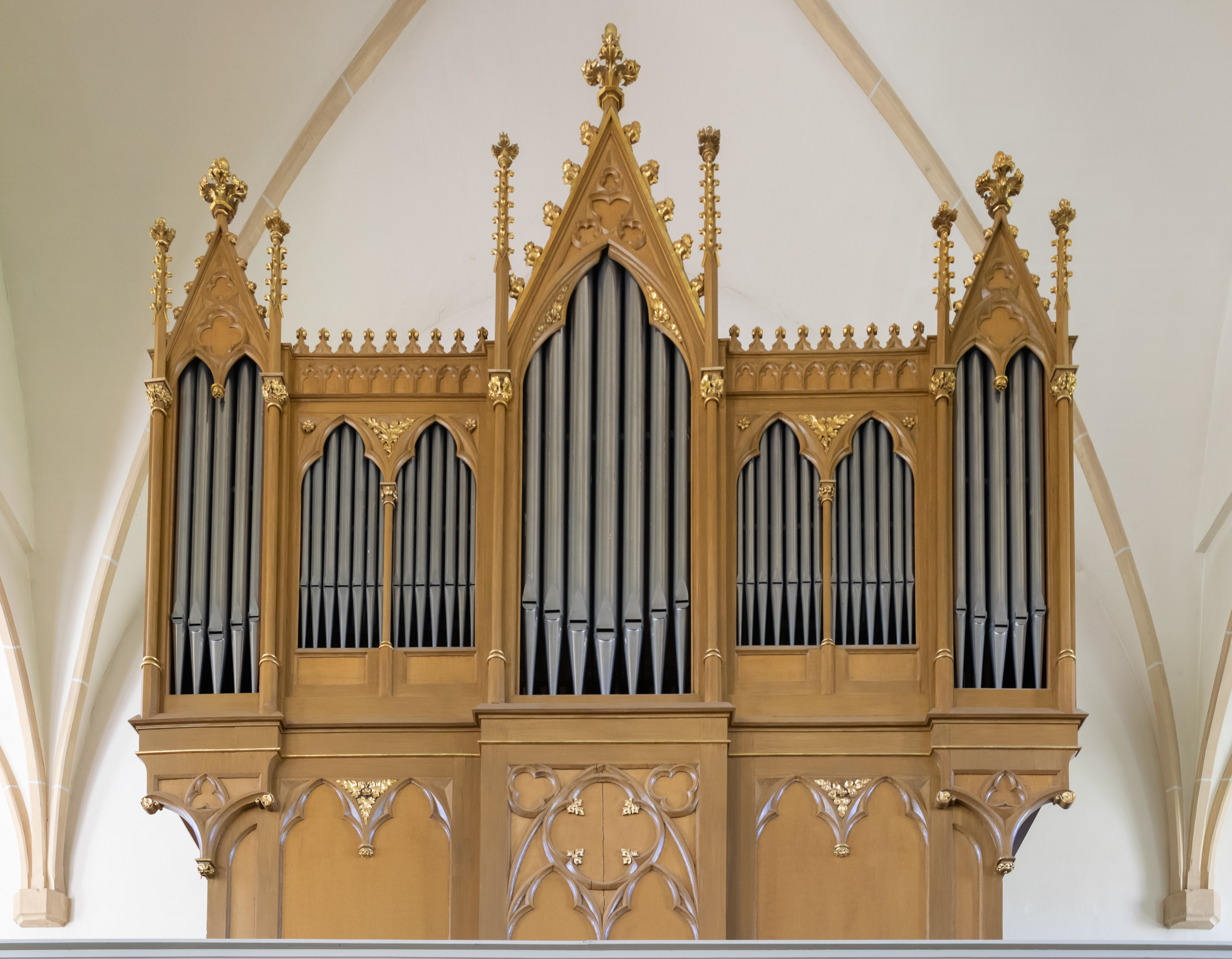 Randebrock-Orgel der evangelisch-reformierten Kirche in Dörentrup-Bega